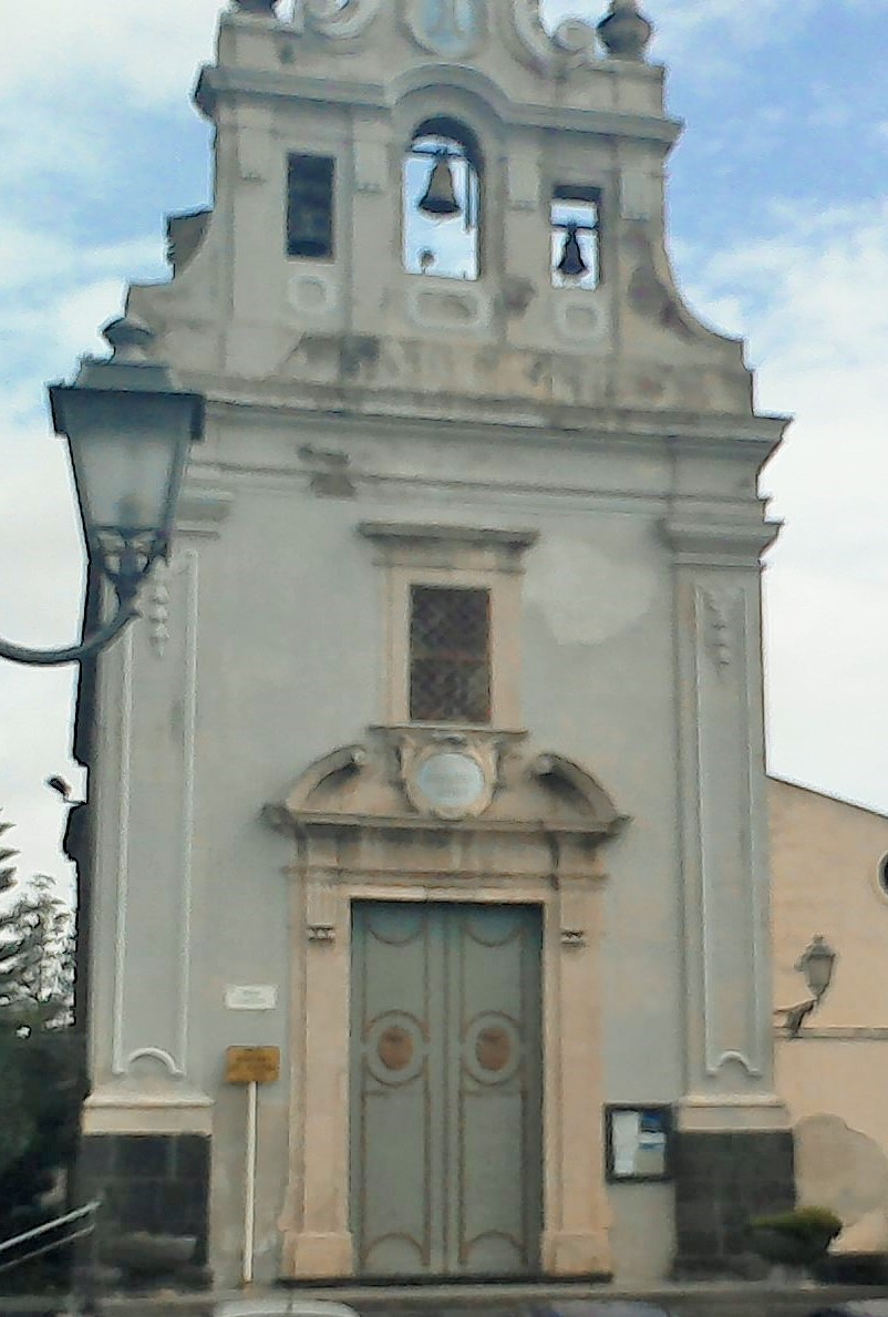 La chiesa della Madonna del Carmine - Misterbianco